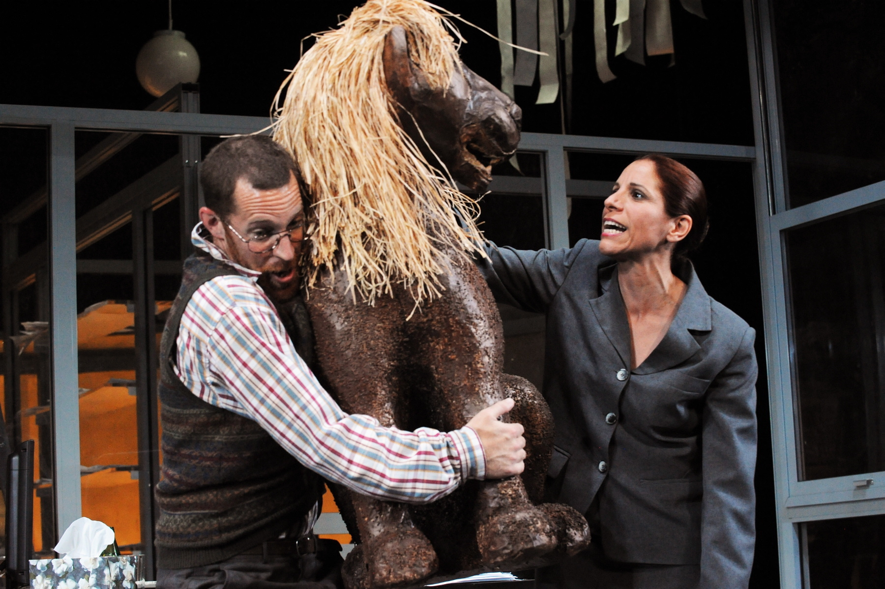 גלעד קלטר ואורנה בנאי - רומן בעבודה 2009